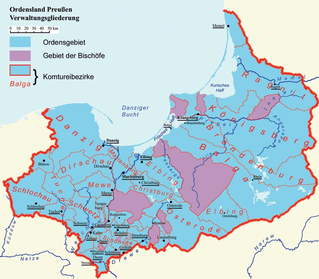 Staat des Deutschen Ordens Ordensland Preußen - Verwaltungsgliederung